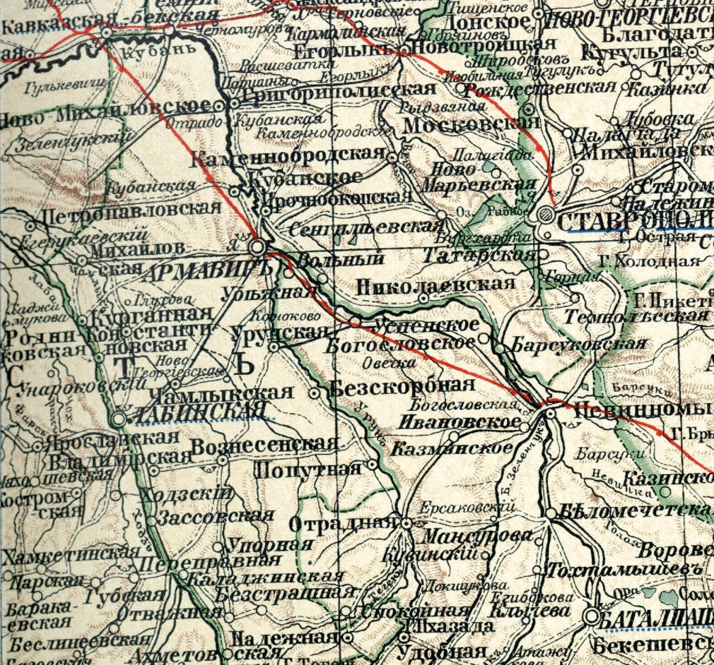 Новый настольный атлас А. Ф. Маркса. СПб., 1903